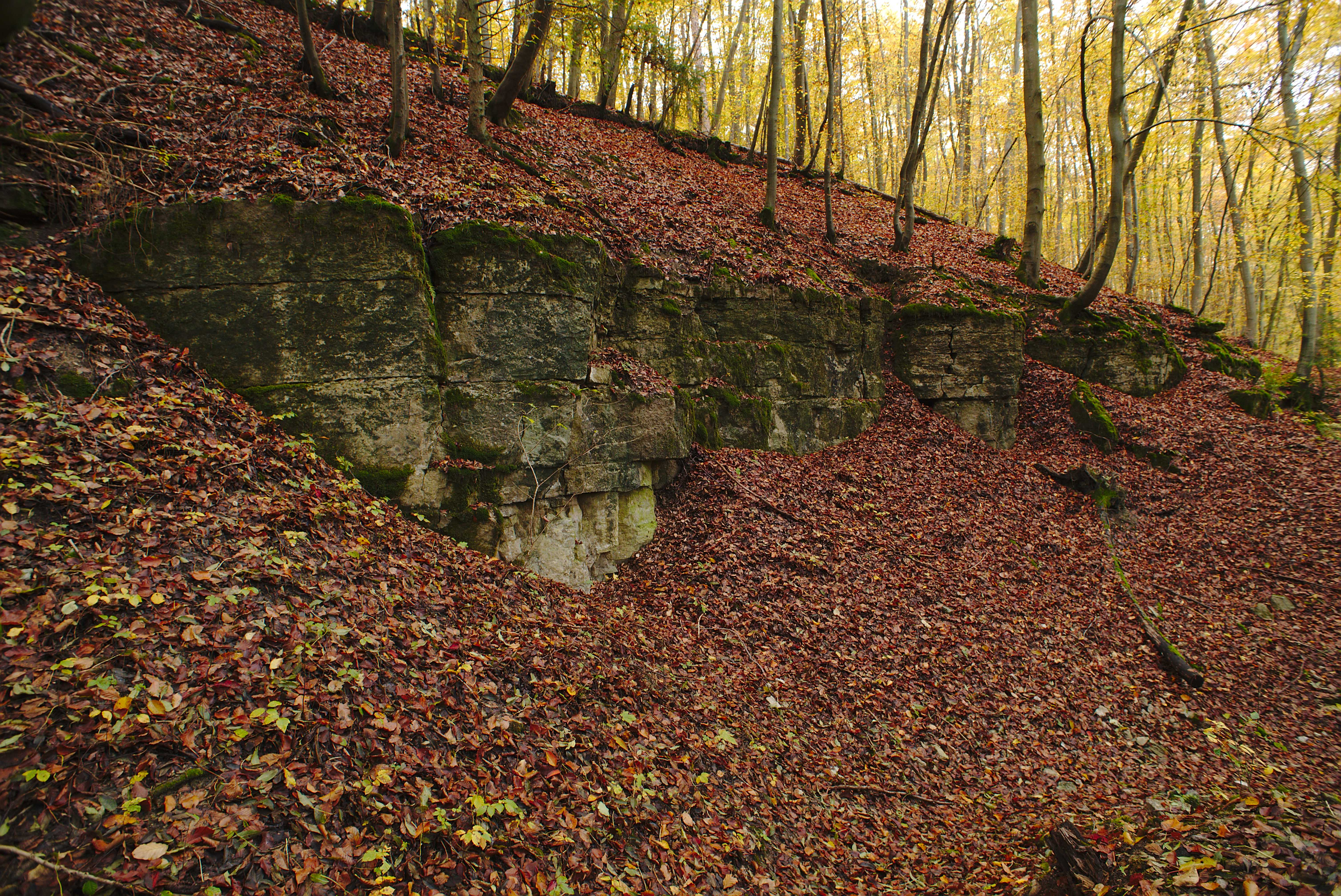 Der ehemalige Kalksteinbruch am Blies-Grenz-Weg.